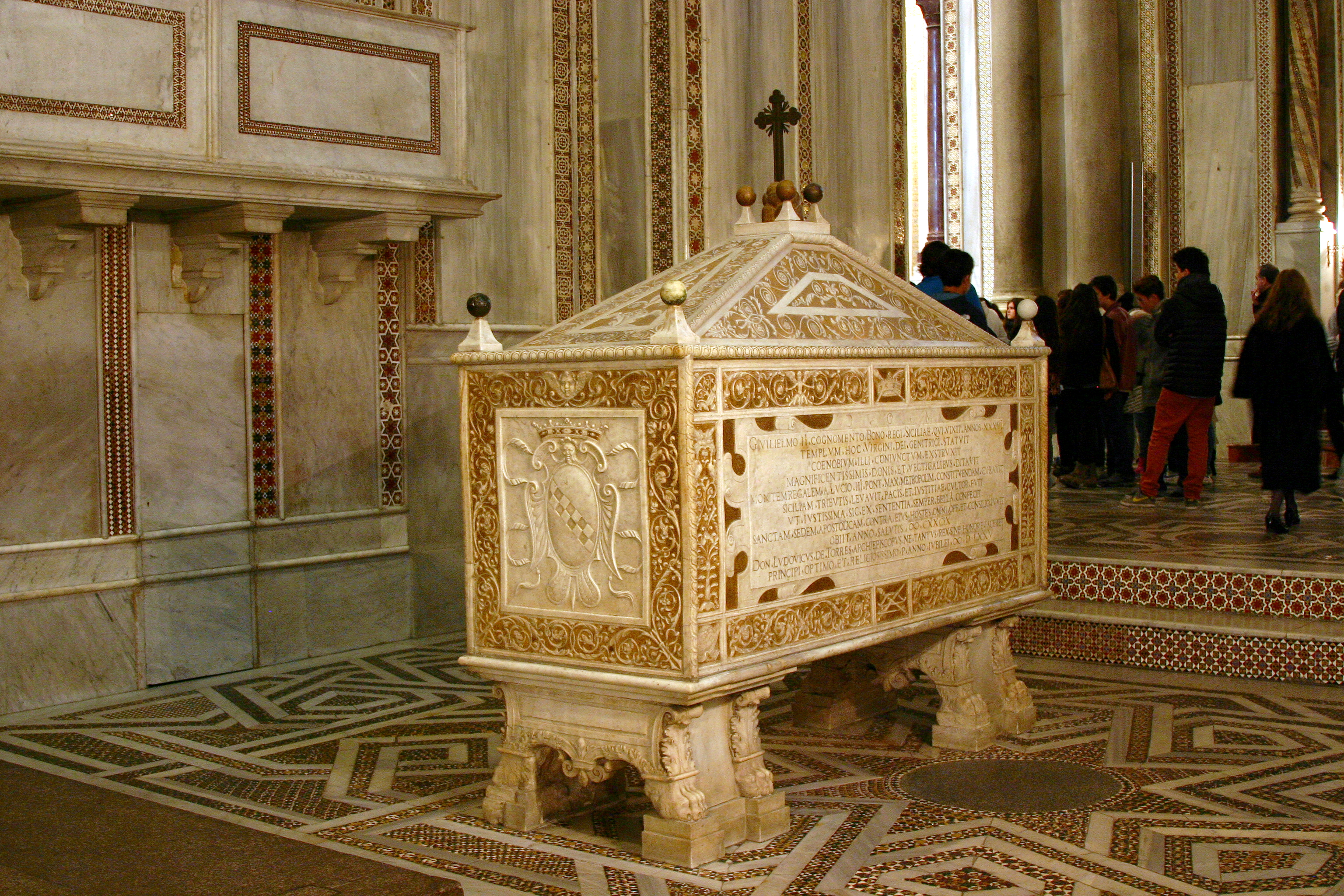 Cathedral of Monreale